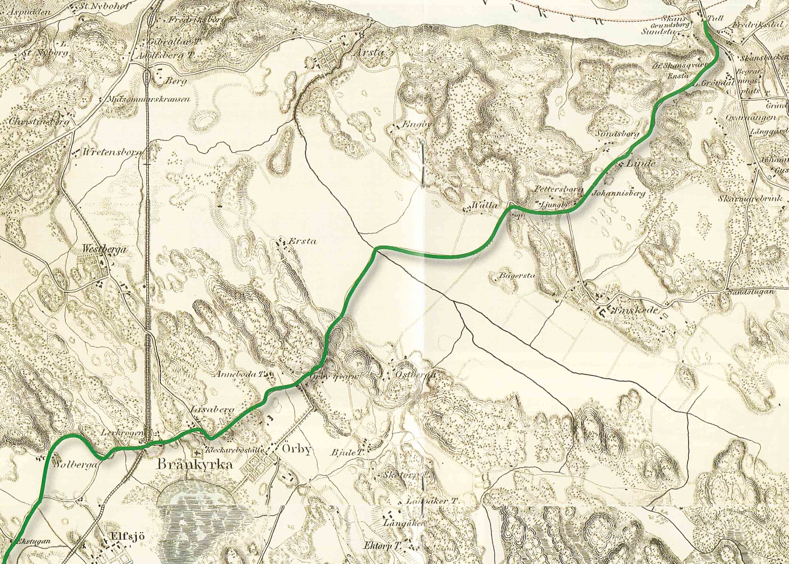 Karta över området söder om Södermalm, med sträckningen av Göta landsväg inritad